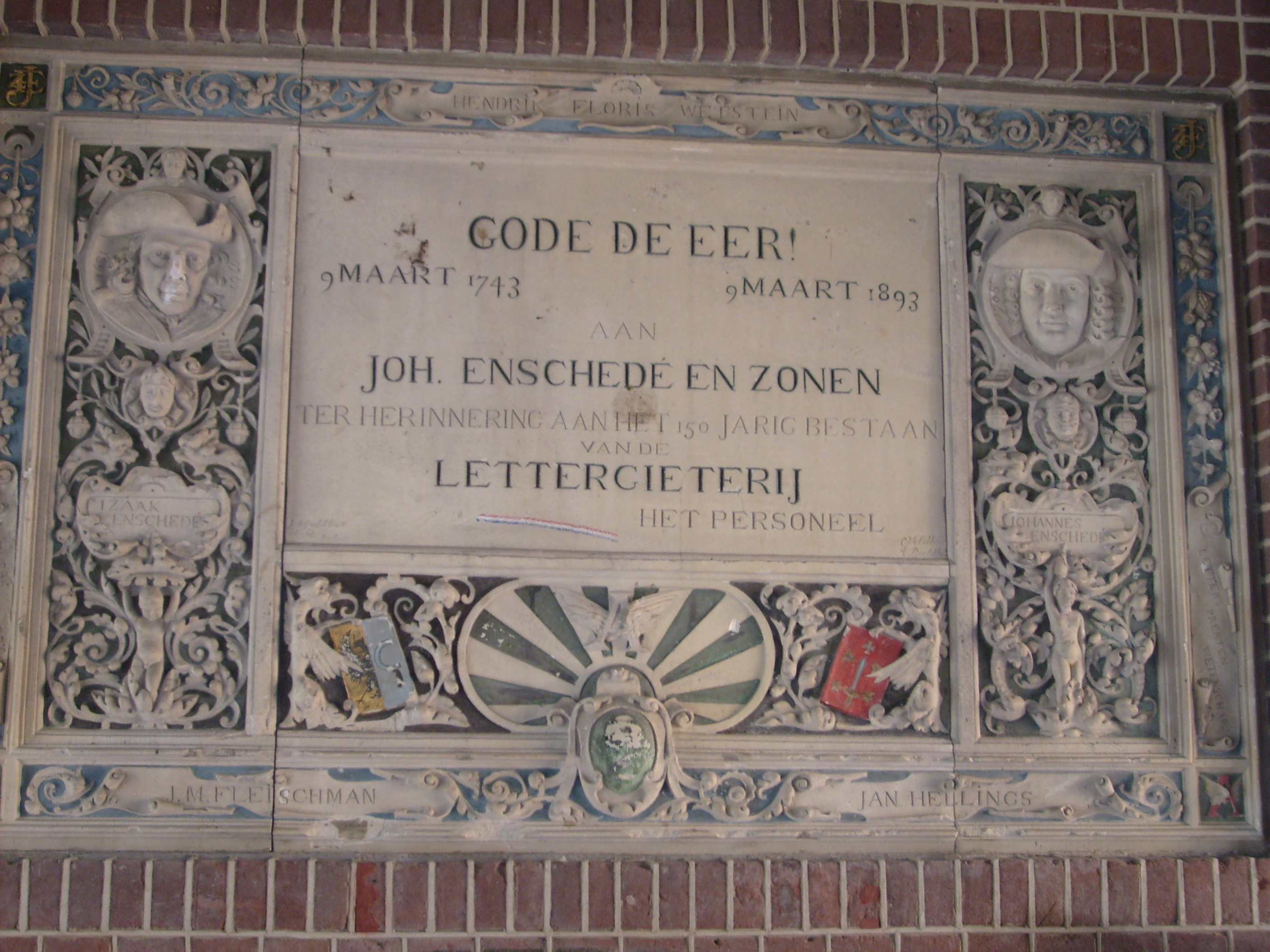 Herdenkingssteen Joh. Enschede voor het 150-jarig bestaan van de drukkerij. De steen is nu te vinden in de poort van de Rechtbank te Haarlem aan het Klokhuisplein.